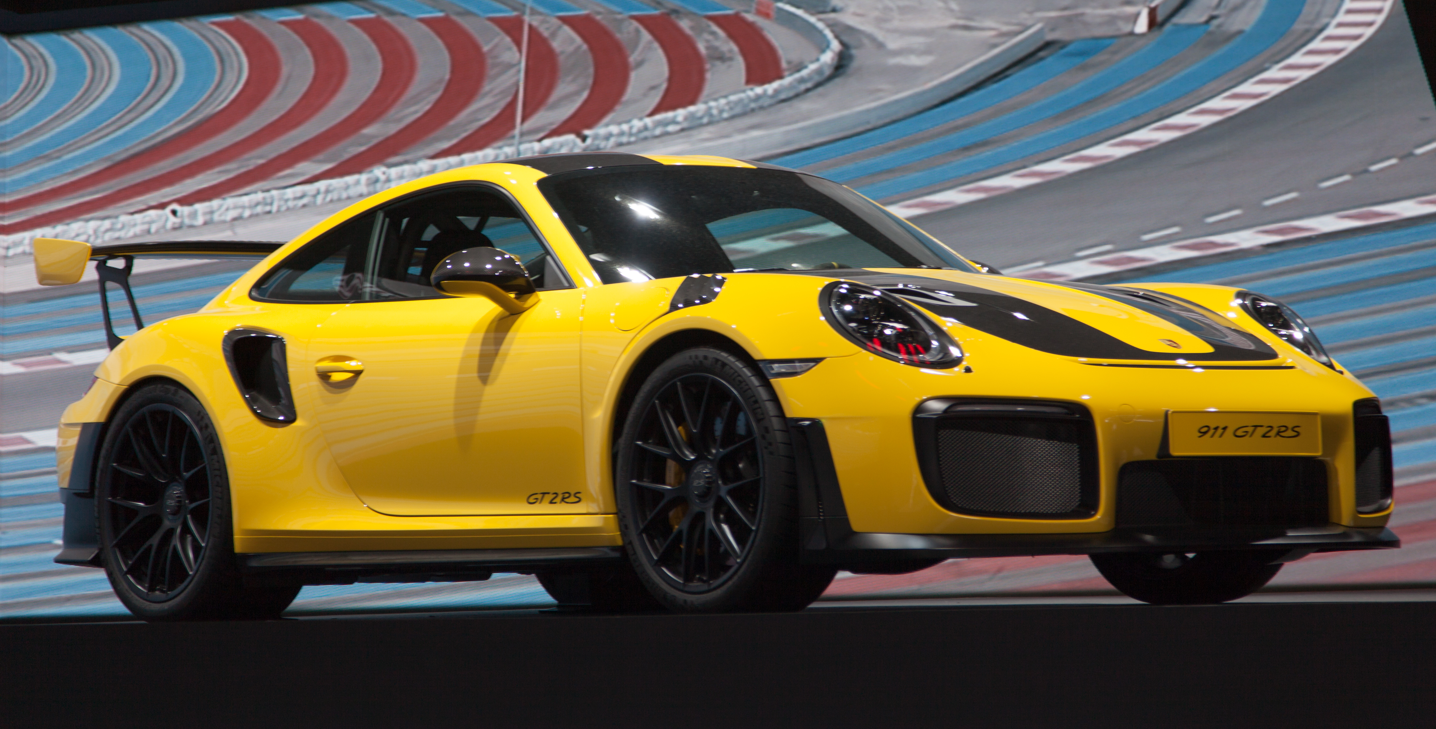 Porsche 911 GT2 RS auf der IAA 2017